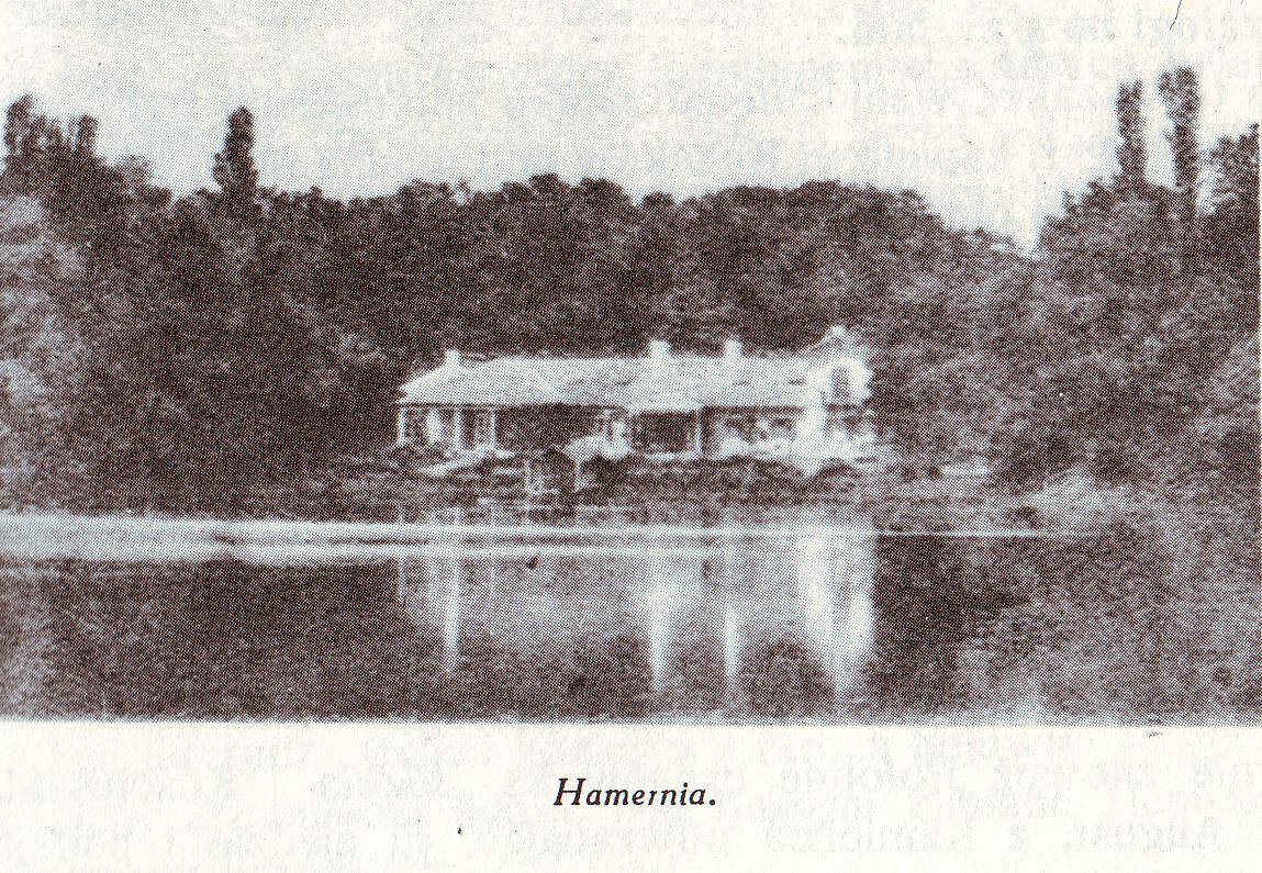 Połonne - dwór Walewskich w Hamernii